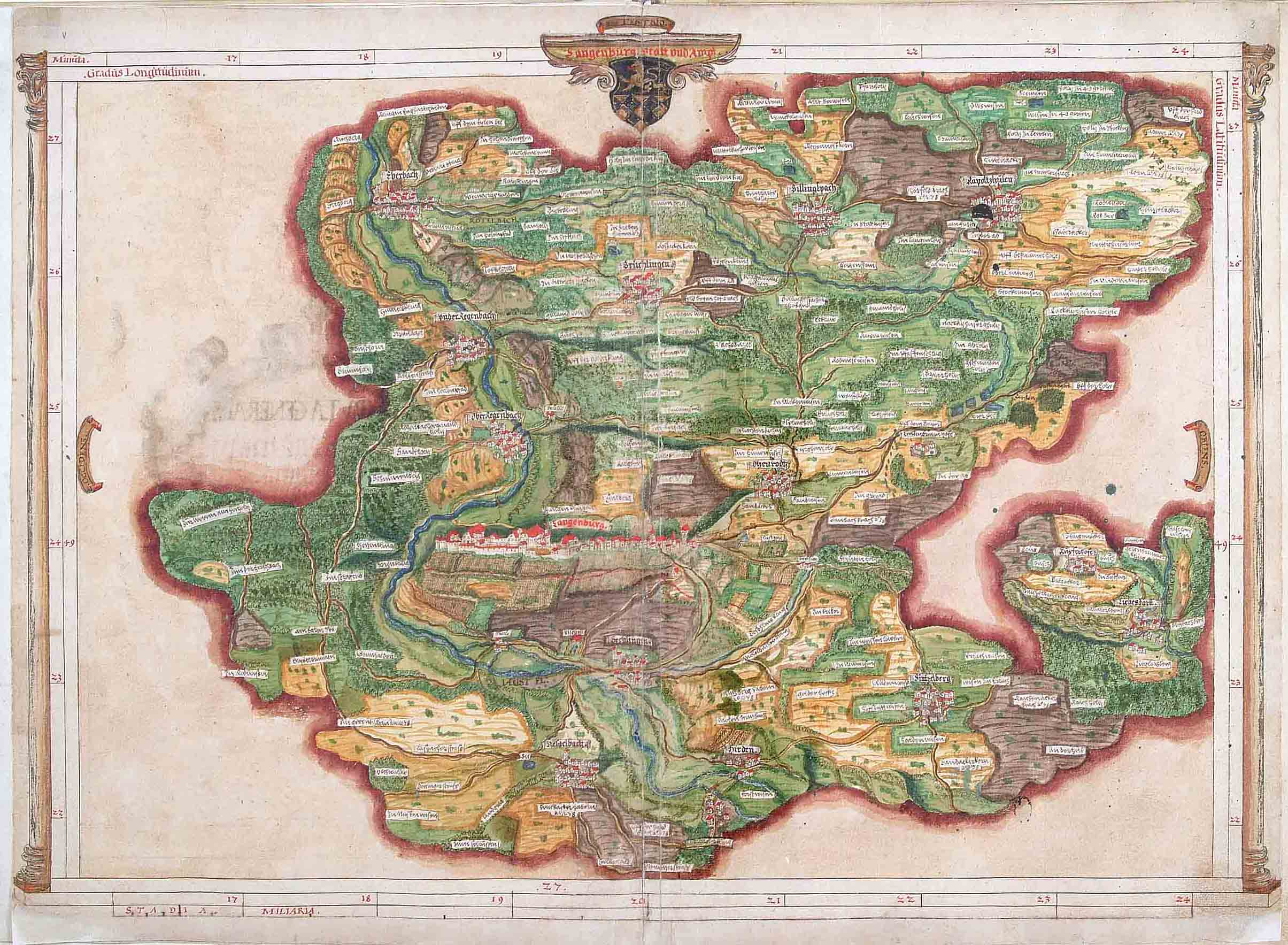 Langenburg und Umgebung, aus dem Atlas von Heinrich Schweickher über die Herrschaft Langenburg, 1578 (HZAN Heinrich Schweickher, Atlas über die Herrschaft Langenburg, 1578 o.S.)